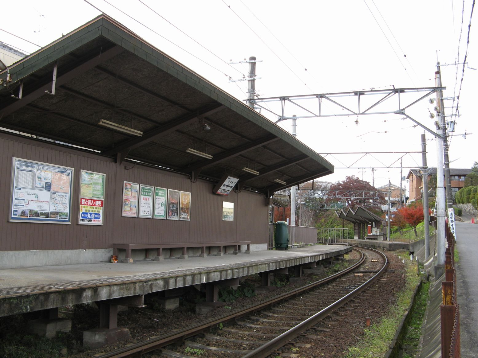 京福電気鉄道（嵐電）宇多野駅 西望。手前が帷子ノ辻方面ホーム、奥が北野白梅町方面ホーム 2007年12月 Bakkai撮影